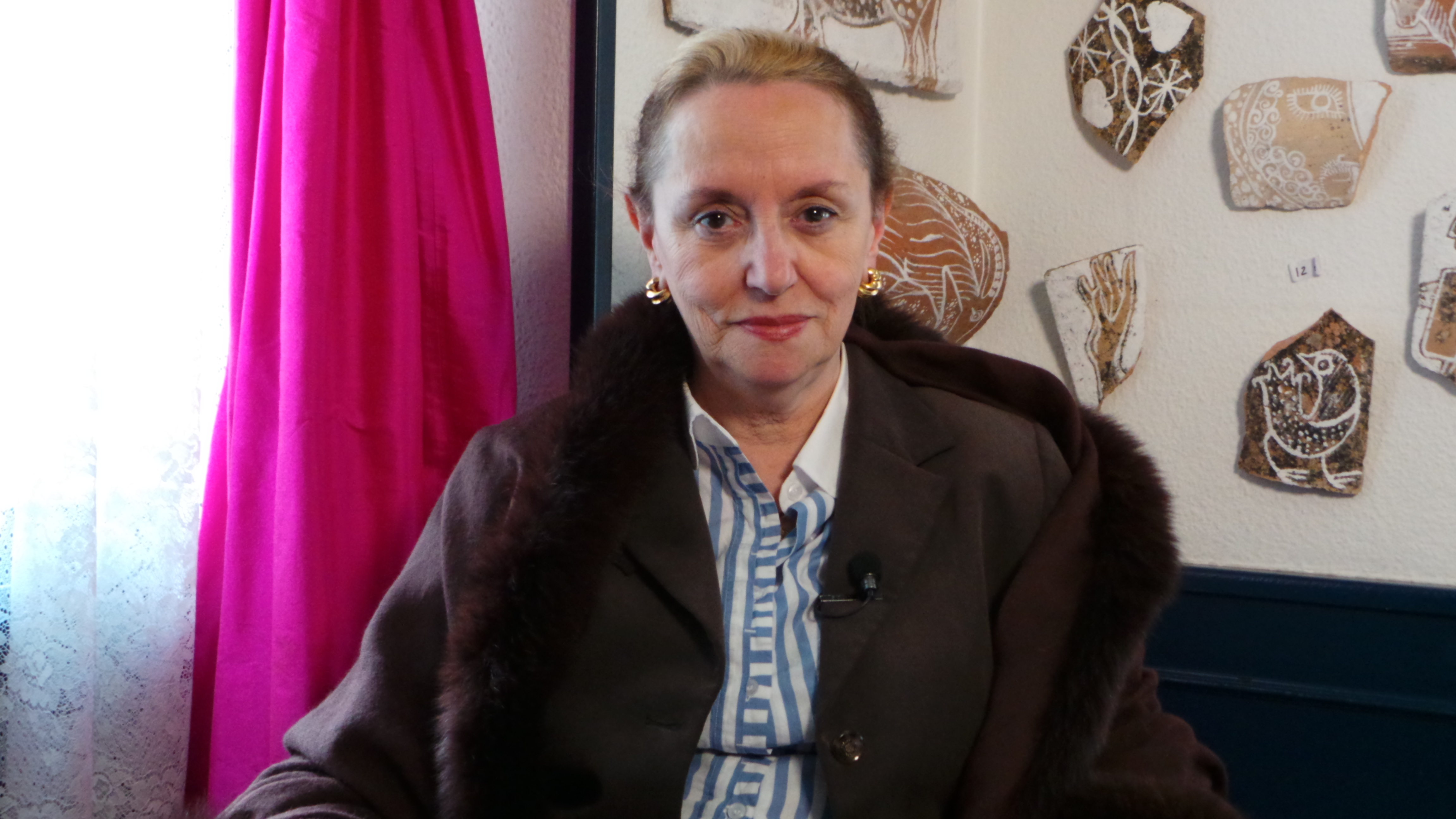 Filósofa Española Una fotografía de Montserrat Boix Madrid